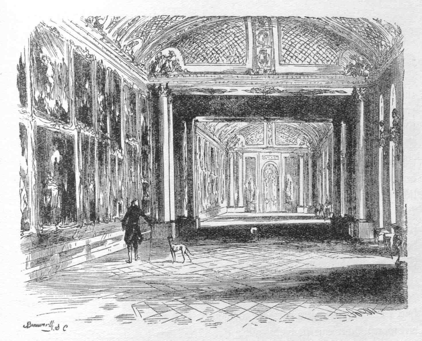 Federzeichnung, Reproduktion von Beneworth